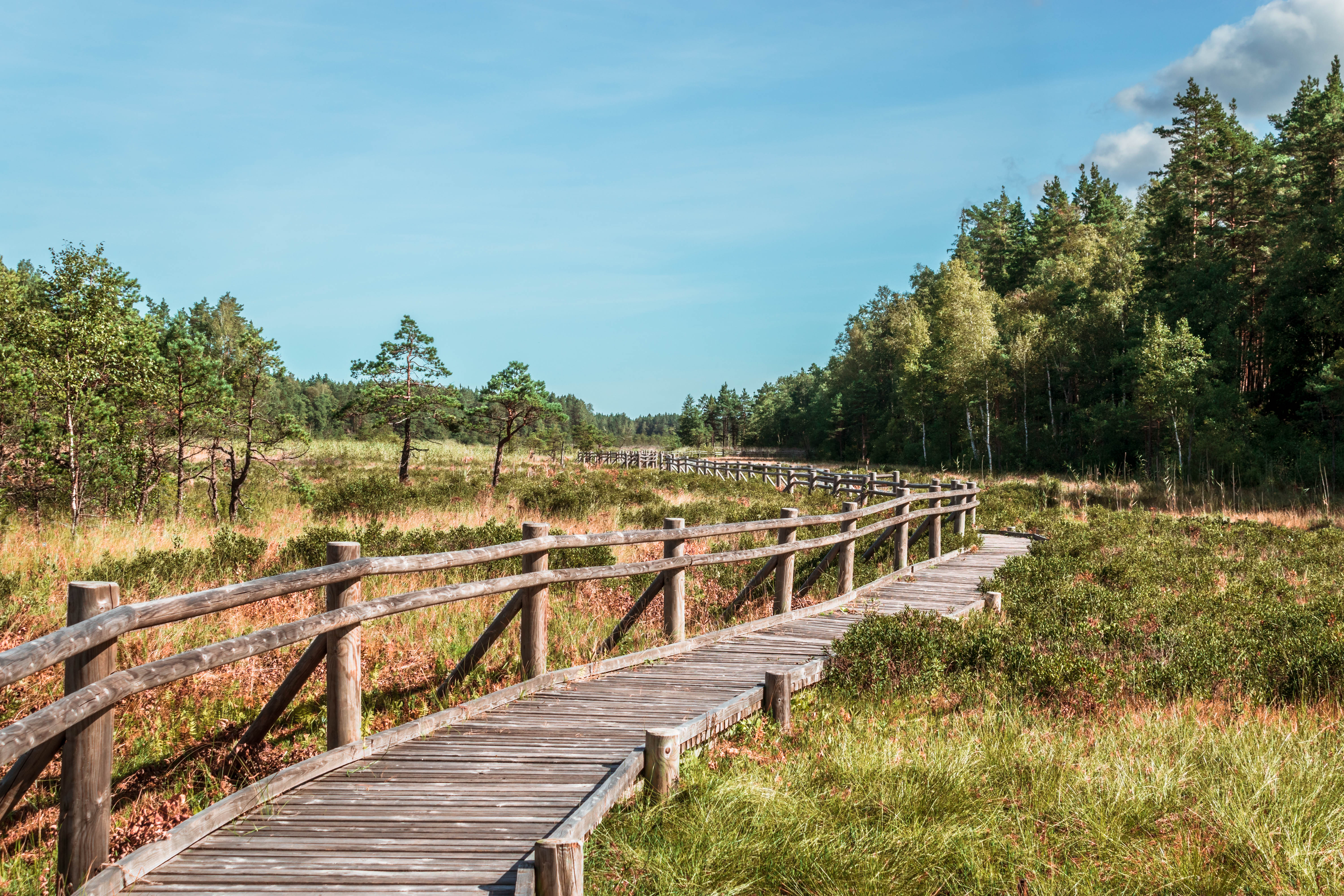 Slīteres nacionālais parks